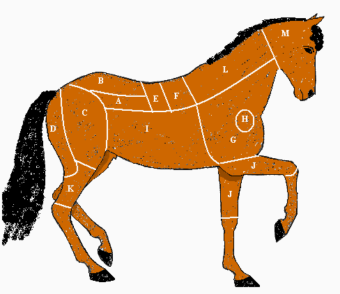 Schematische Darstellung der Schlachtteile beim Pferd A) Filet, ist der am wenigsten beanspruchte Muskel und daher das beste Stück vom Pferd (liefert Steakfleisch) B) Hinterrücken, ist ganz schier, ohne Speck und Sehne (liefert Steak vom Rücken) C) Oberschale mit Oberschalendeckel, ist zartes, saftiges Fleisch (liefert Steakfleisch aus Oberschale und Roulade aus Oberschalendeckel) D) Seemer und Seemerrolle, liefert Fleisch zum Schmoren (Braten, Rouladen, Gulasch) E) Vorderrücken, liefert Steakfleisch (Grillen, Kurzbraten, Überbacken) F) Hochrippe, liefert Fleisch zum Schmoren (Schmorfleisch, Gulasch) G) Brust, liefert Fleisch zum Schmoren (Schmorfleisch, Gulasch) H) Bug, liefert Fleisch zum Räuchern und Pökeln (Pferdeschinken, Rauchfleisch) I) Bauchlappen J) Vorderes Beinfleisch, ist sehr sehnig und liefert Fleisch zum Kochen (Suppenfleisch, Kochwurst) K) Hinteres Beinfleisch L) Nacken M) Kopf, liefert zusammen mit I), K), L) Verarbeitungsfleisch (Knackwurst, Kochwurst, Pferdefett usw.)